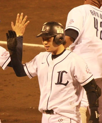 asamura hiseto lions